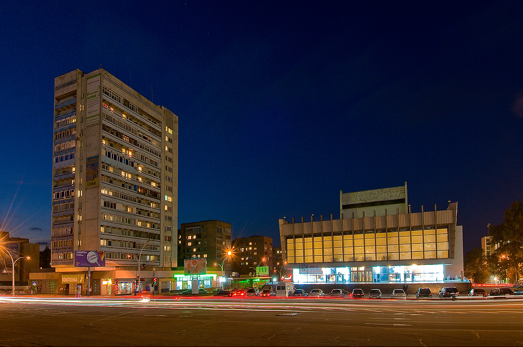 Луганск.Драматический театр.13 октября 2008